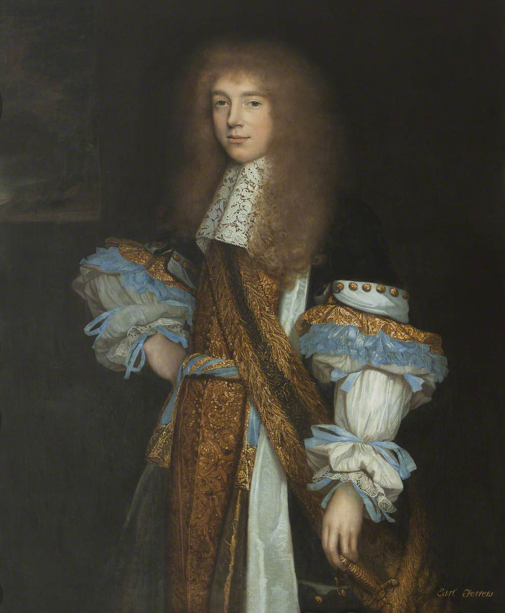 Lord Ferrers